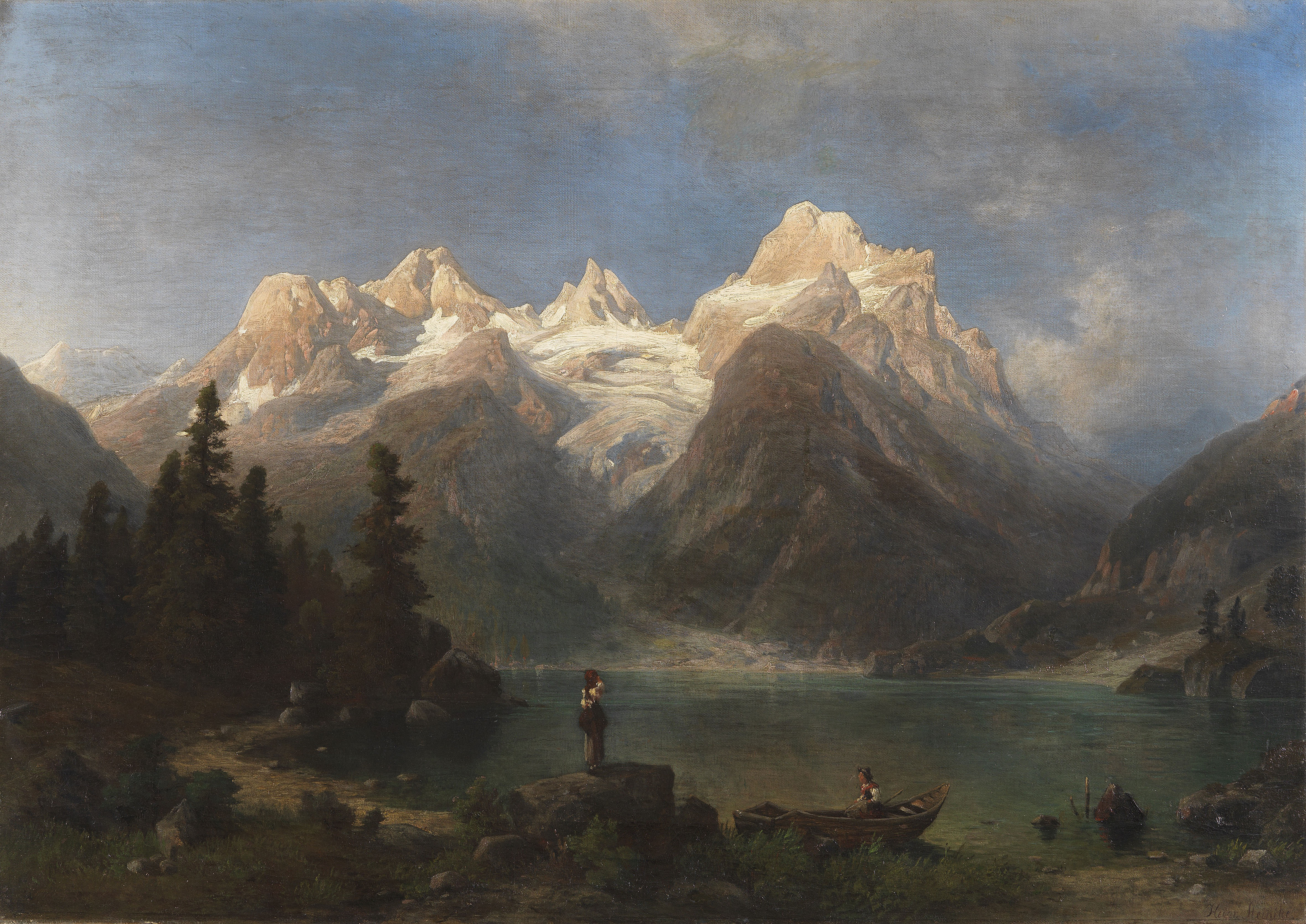 Gebirgslandschaft mit Gletscher und Bergsee. 2. Hälfte 19. Jahrhundert. Öl auf Leinwand. Rechts unten signiert. 62 x 88 cm